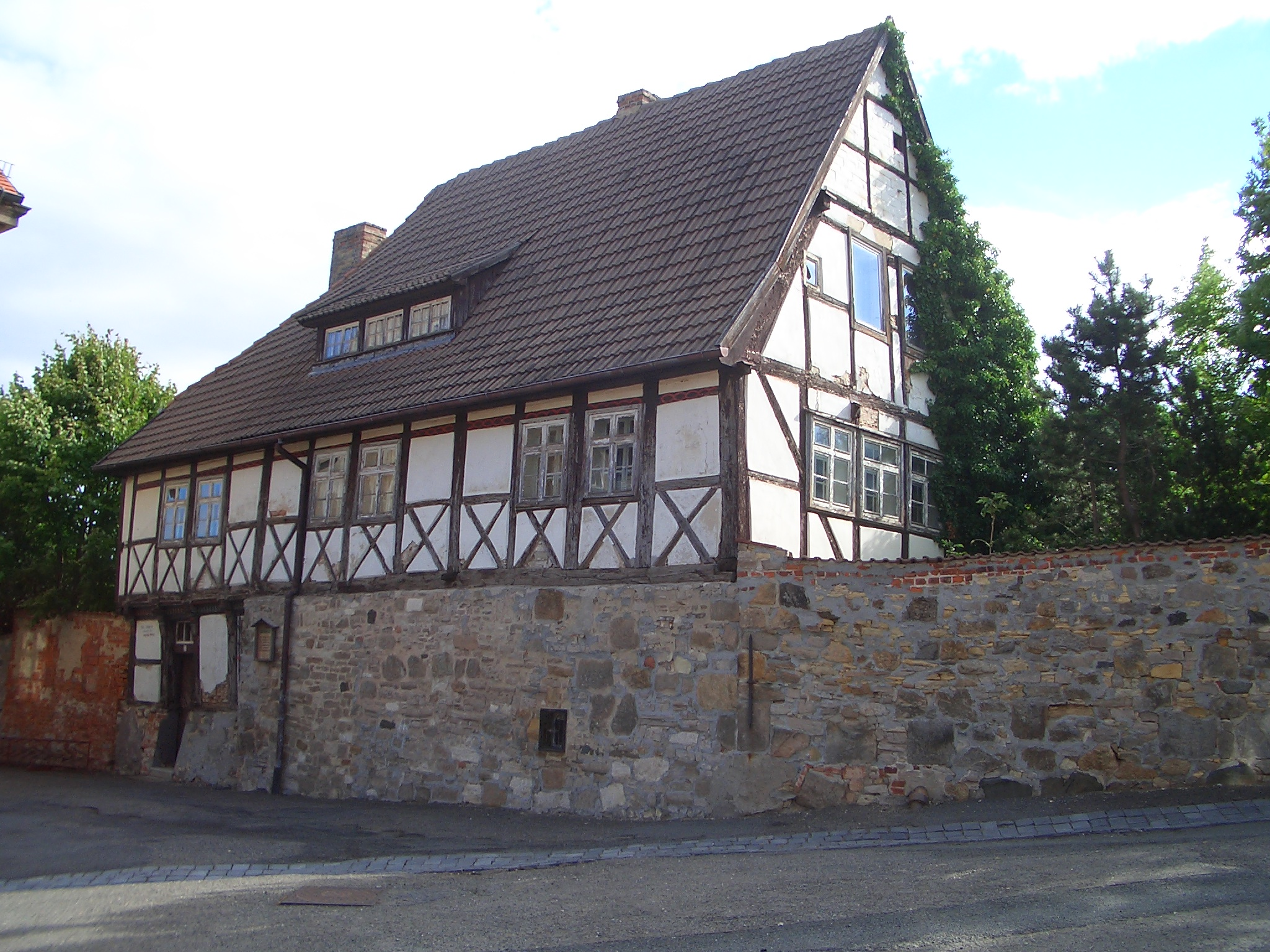 Küsterhaus